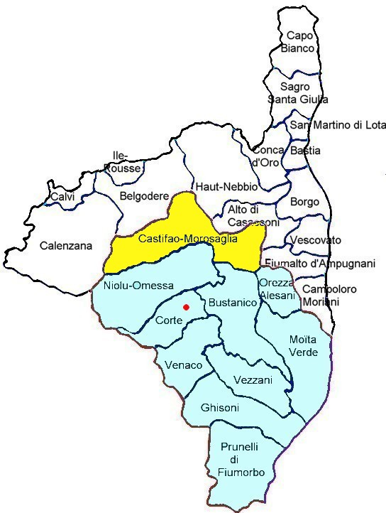 Canton de Castifao-Morosaglia, Haute-Corse. Canton électoral actuel, à cheval sur Golu. Comprenant une partie de la Castagniccia (pieve de Rustinu) et la pieve de Caccia, en regroupant électoralement les anciens cantons de Morosaglia et de Castifao. Corsu: Ghjura eletturale, Golu da fiume in qua è da fiume in da. Pezzu di Castagniccia (pieve di Rustinu) è pieve di Caccia. Vecchji cantoni di Merusaglia è di Castifau.